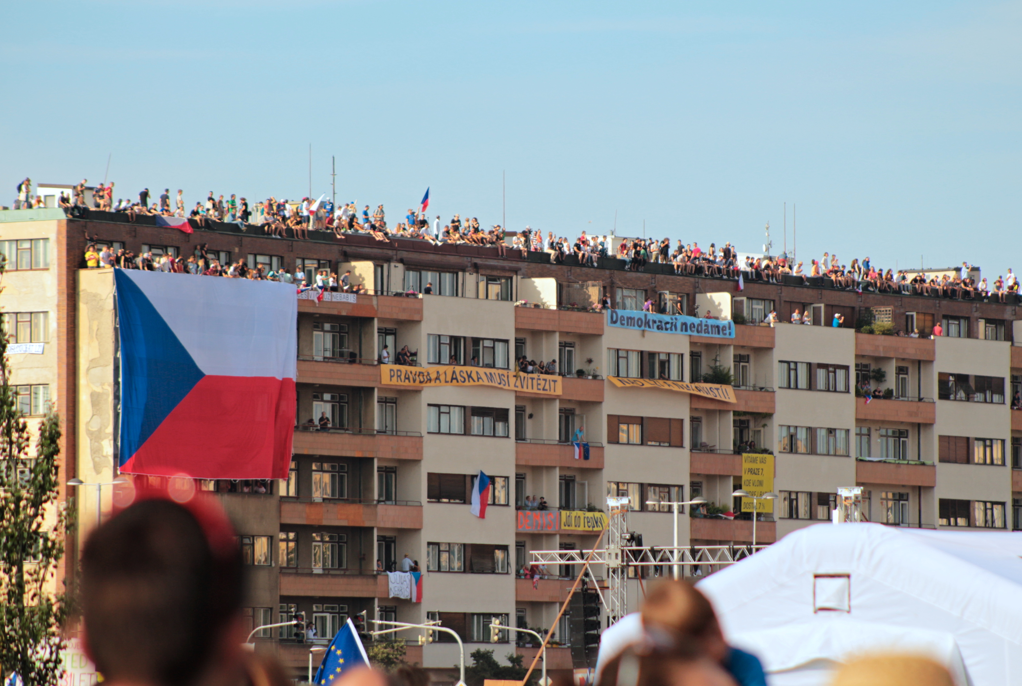 Praha-Letná 2019 demonstrace „Je to na nás!“